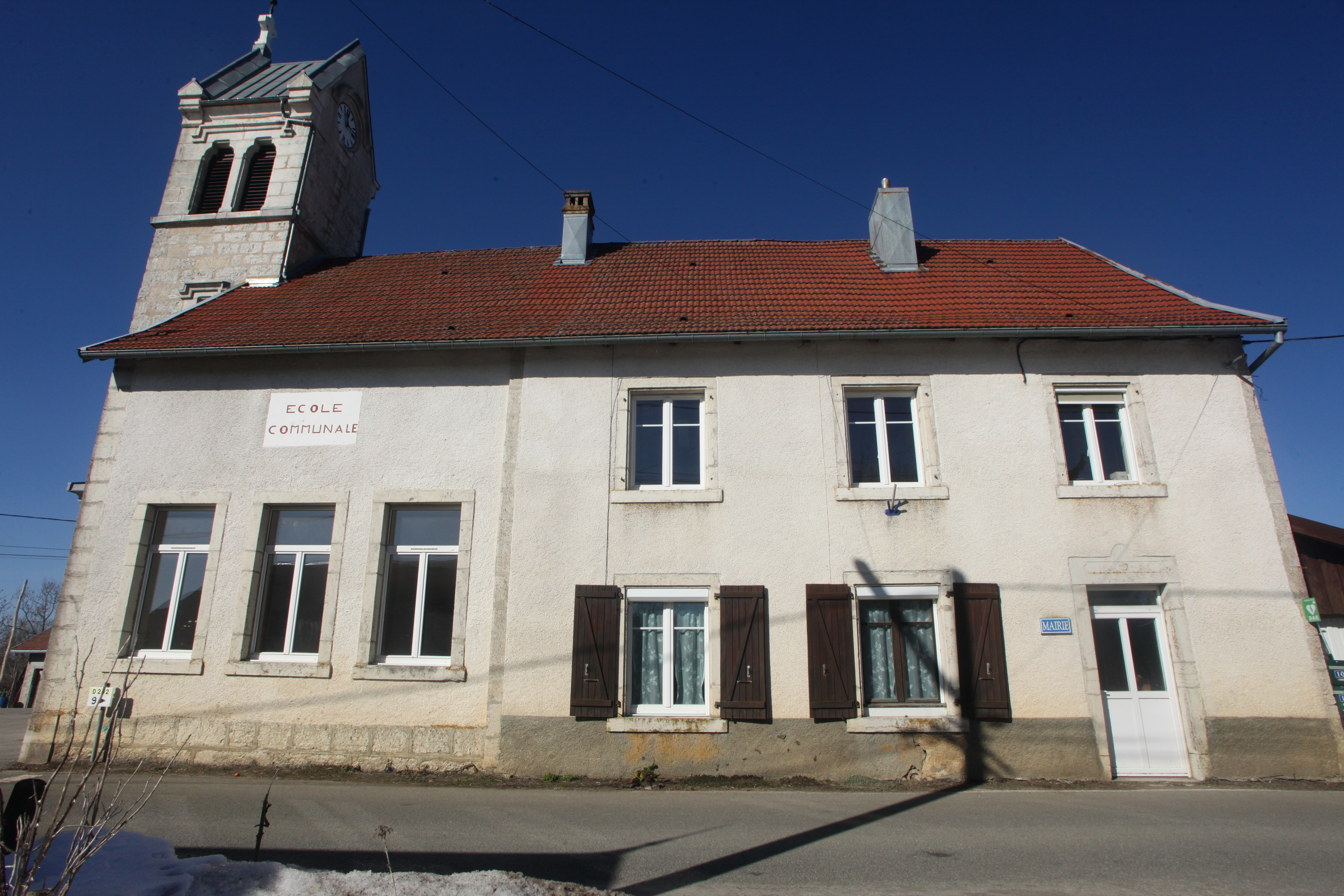 Mairie-école de La Bosse. Le clocher ne correspond pas à une église.